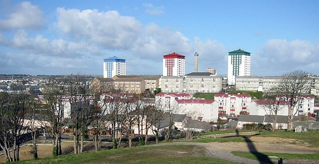 Devonport